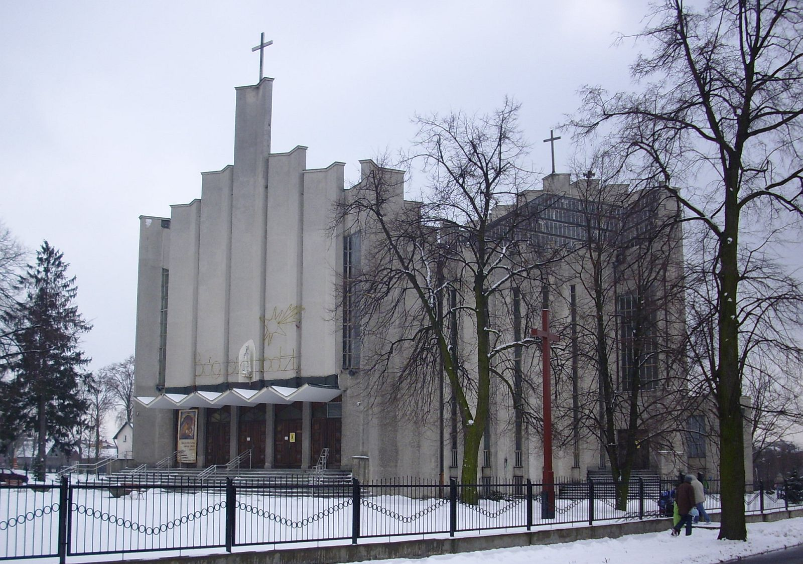 Biała Podlaska. Kościół parafialny pw. Wniebowzięcia NMP z lat 1979‒1984.